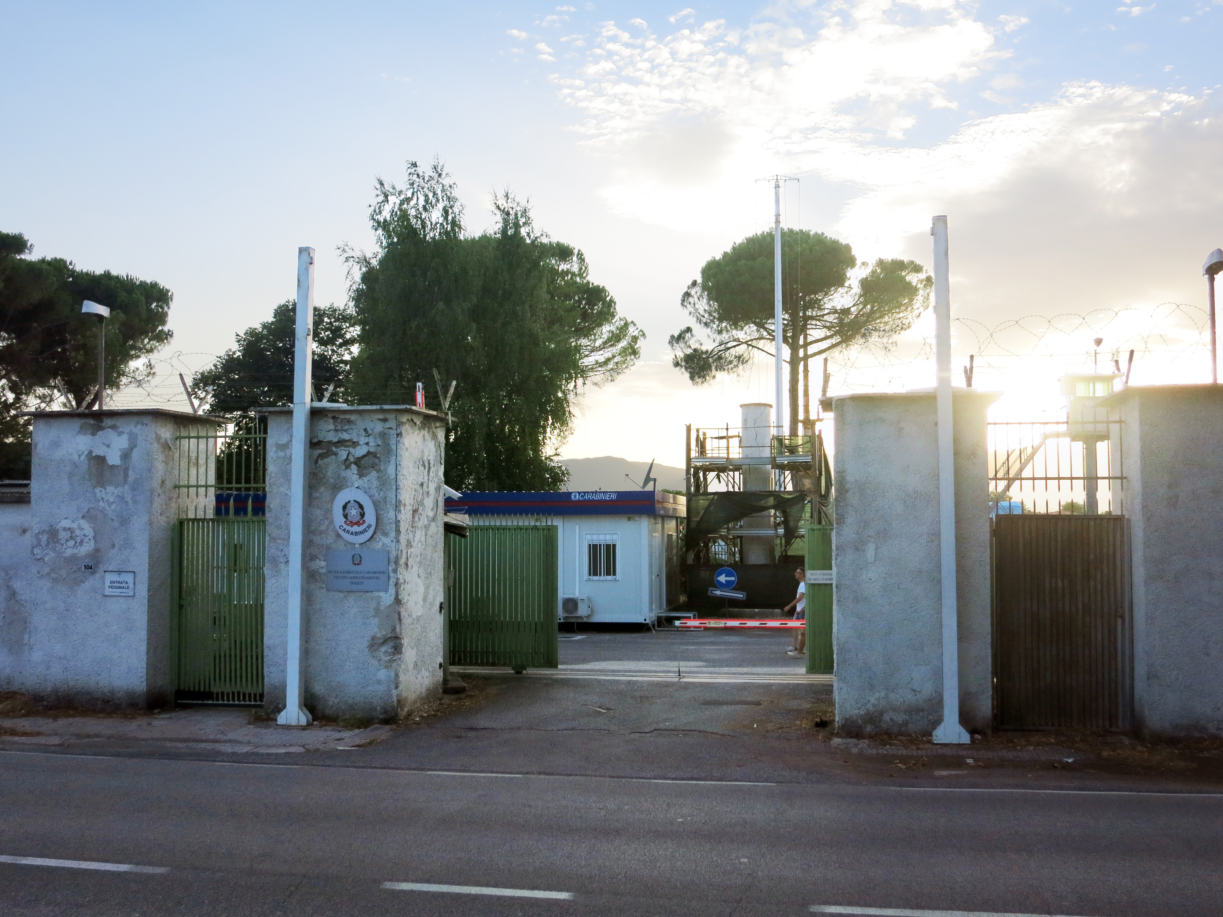 L'ingresso dell'aeroporto Ciuffelli di Rieti (Lazio), su viale Marco Curio Dentato, che conduce all'ex Centro operativo aereo (COA) della Guardia Forestale, oggi sede del 16° nucleo elicotteri Carabinieri.